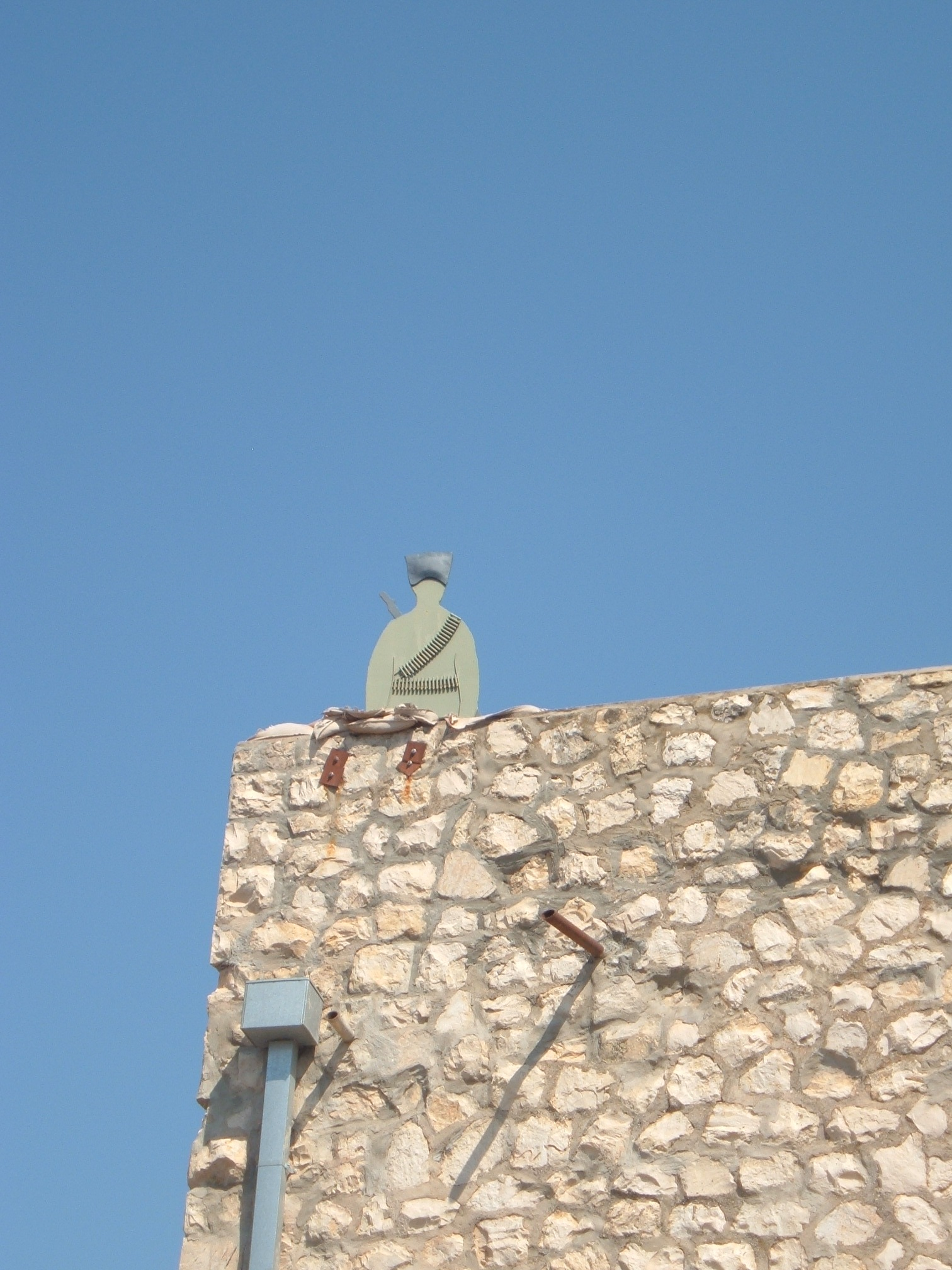 Tin guard watching from the tower of Birya fortress. נוטר מפח משקיף ממגדל מצודת ביריה